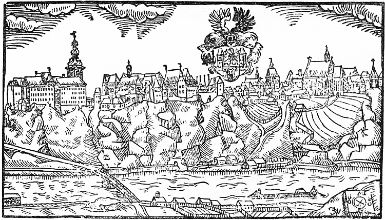 Bechyně, signován Jan Willenberg,1602